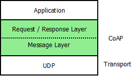 CoAP macro